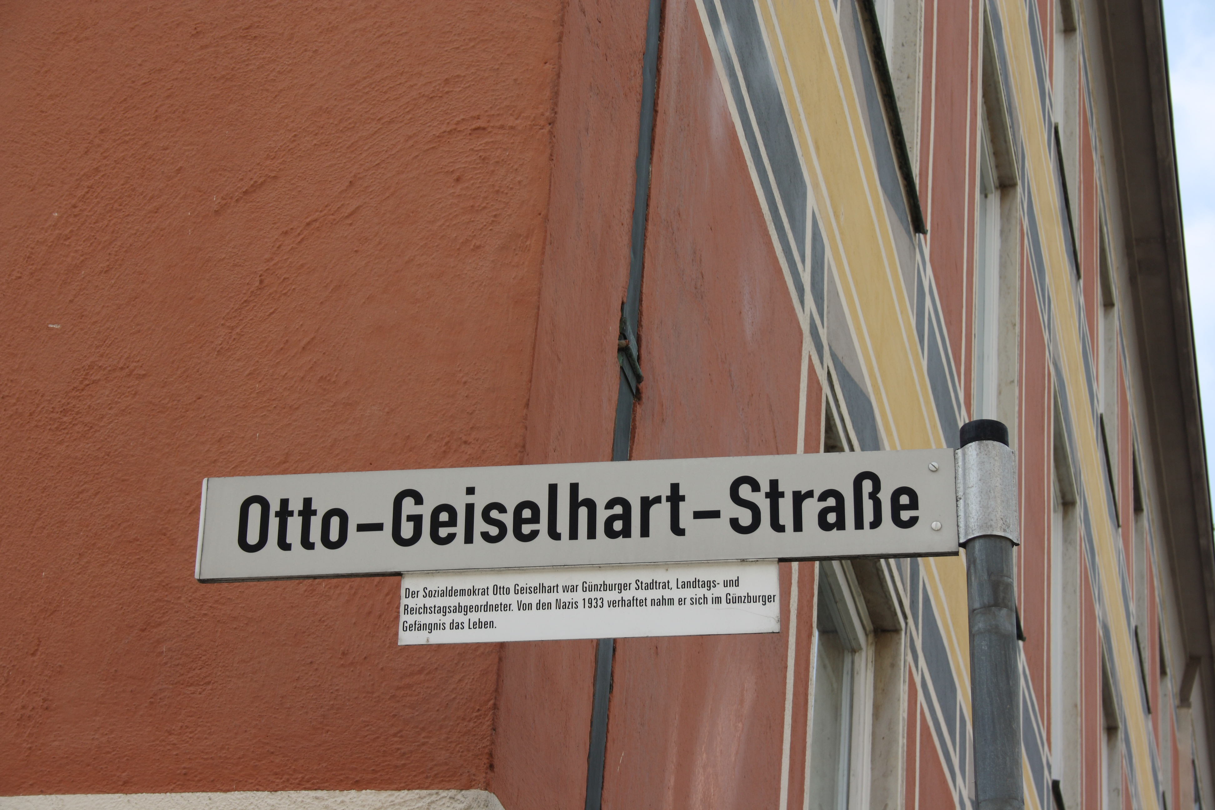 Straßenschild Otto-Geiselhart-Straße in Günzburg (Bayern), benannt nach Otto Geiselhart (1890-1933), sozialdemokratischer Reichstagsabgeordneter